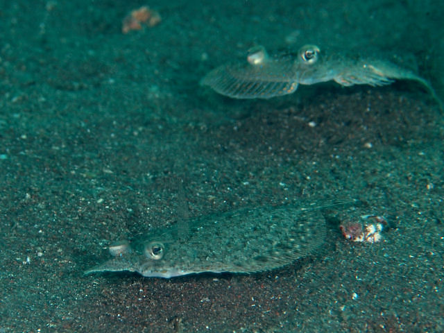 ダルマガレイ Engyprosopon grandisquama